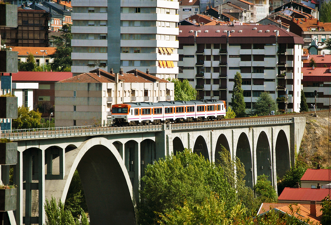 RENFE 592.000 - Viaducto sobre la N-120 y el Río Miño, Orense (España)